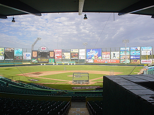 Fotografia desde el area de Numerados Seccion B